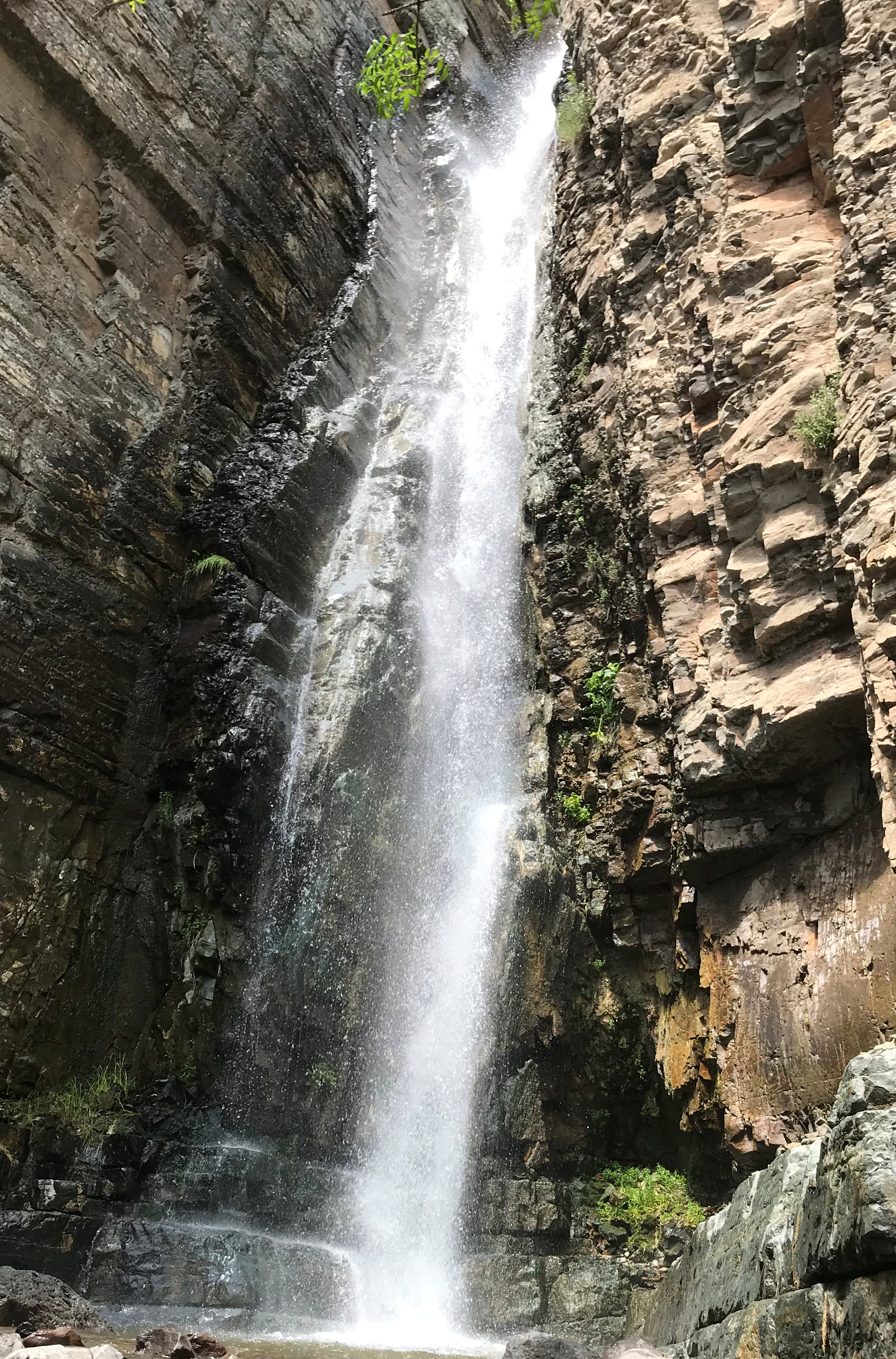 Хосровский лес